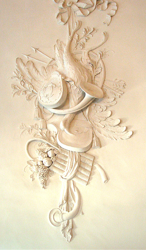 Столовая_3